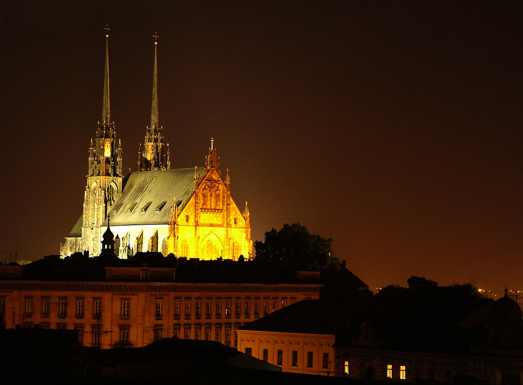 Petrov from Špilberk - night view